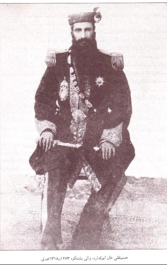 حسين قلي خان بن حيدر خان بن حسن خان (والي بشتكوه)